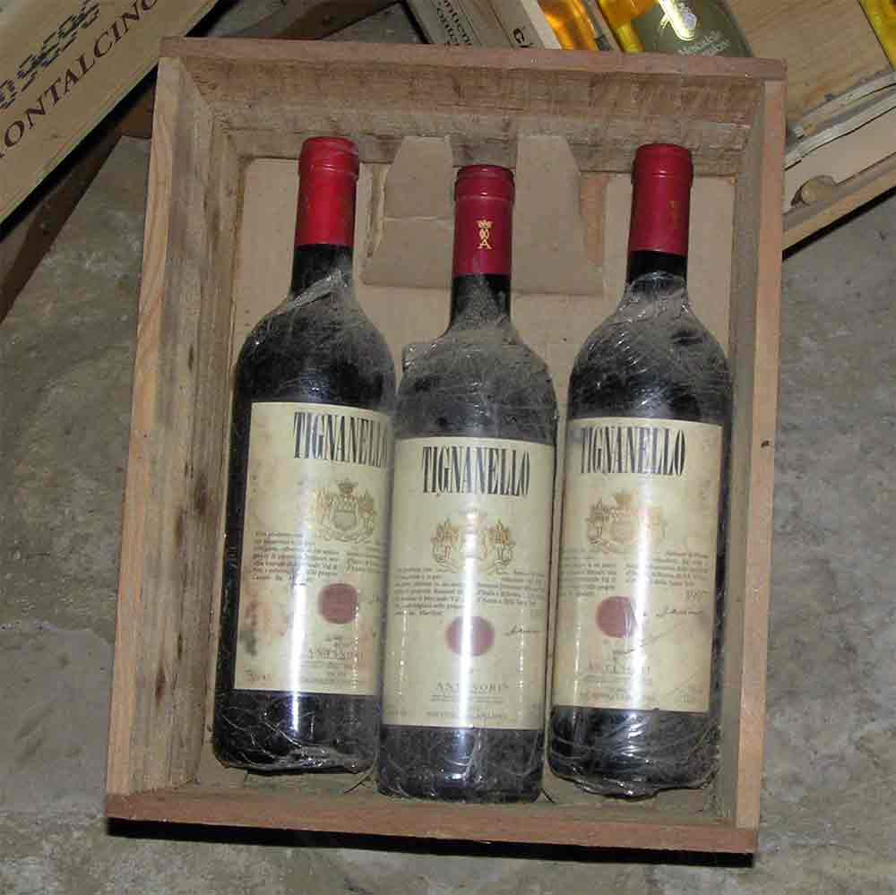 Beschreibung: Kiste mit Tignanello-Flaschen – eine Kostbarkeit. Fotograf: Benutzer:BMK 8/2004 Please send reference and voucher copy to BMK(at)clever.ms Bitte Quellenangabe und Beleg an BMK(at)clever.ms